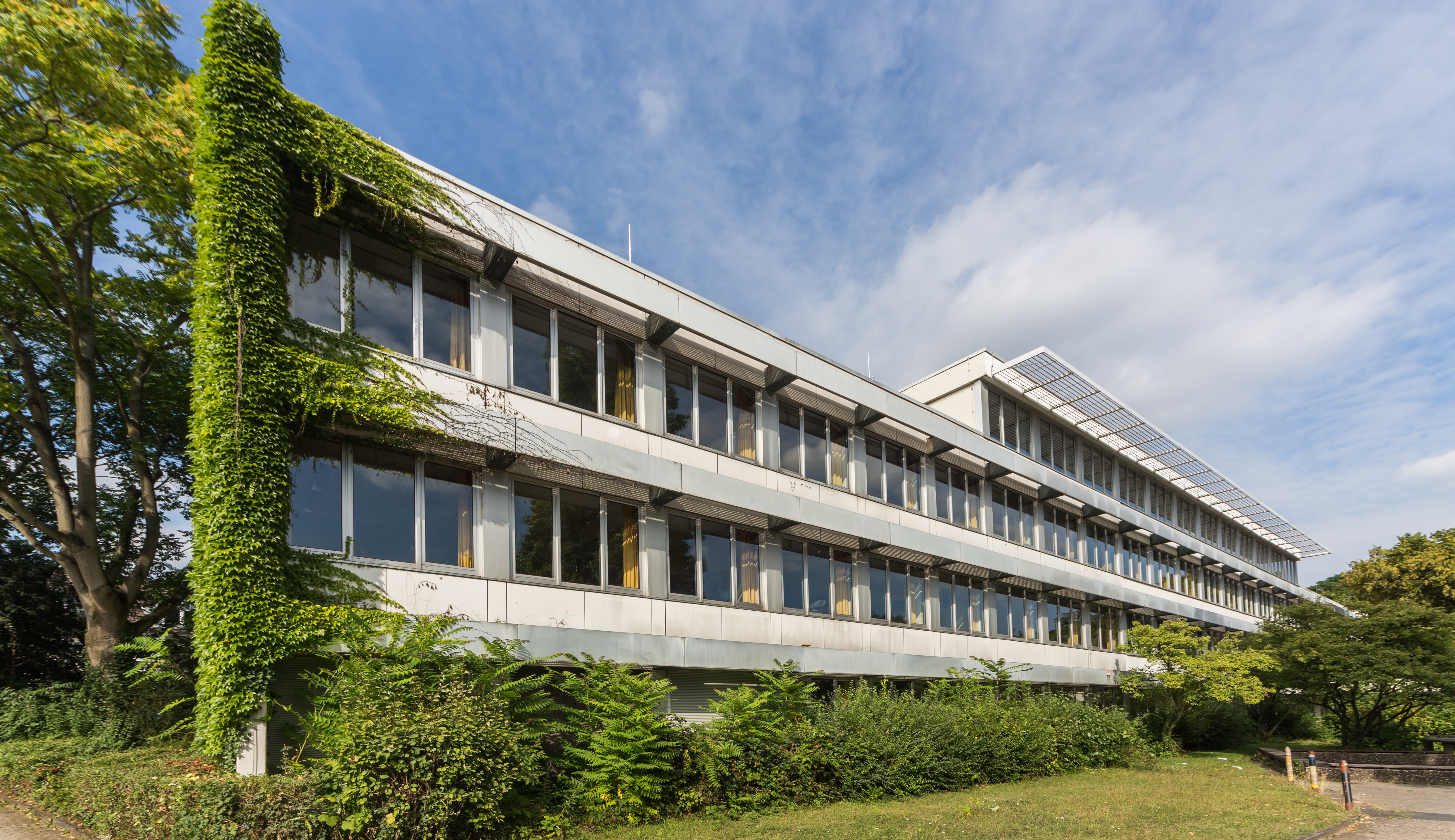 Gottfried-Kinkel-Schule, August-Bier-Straße 2a, Bonn, district Kessenich: viewing direction east